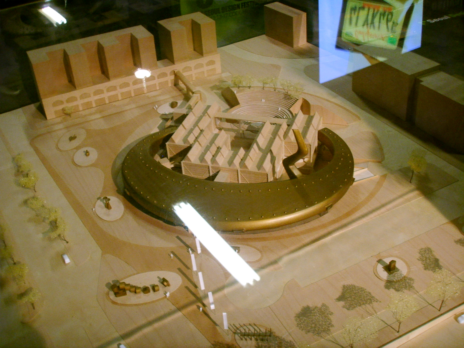 Progetto per il nuovo museo pecci